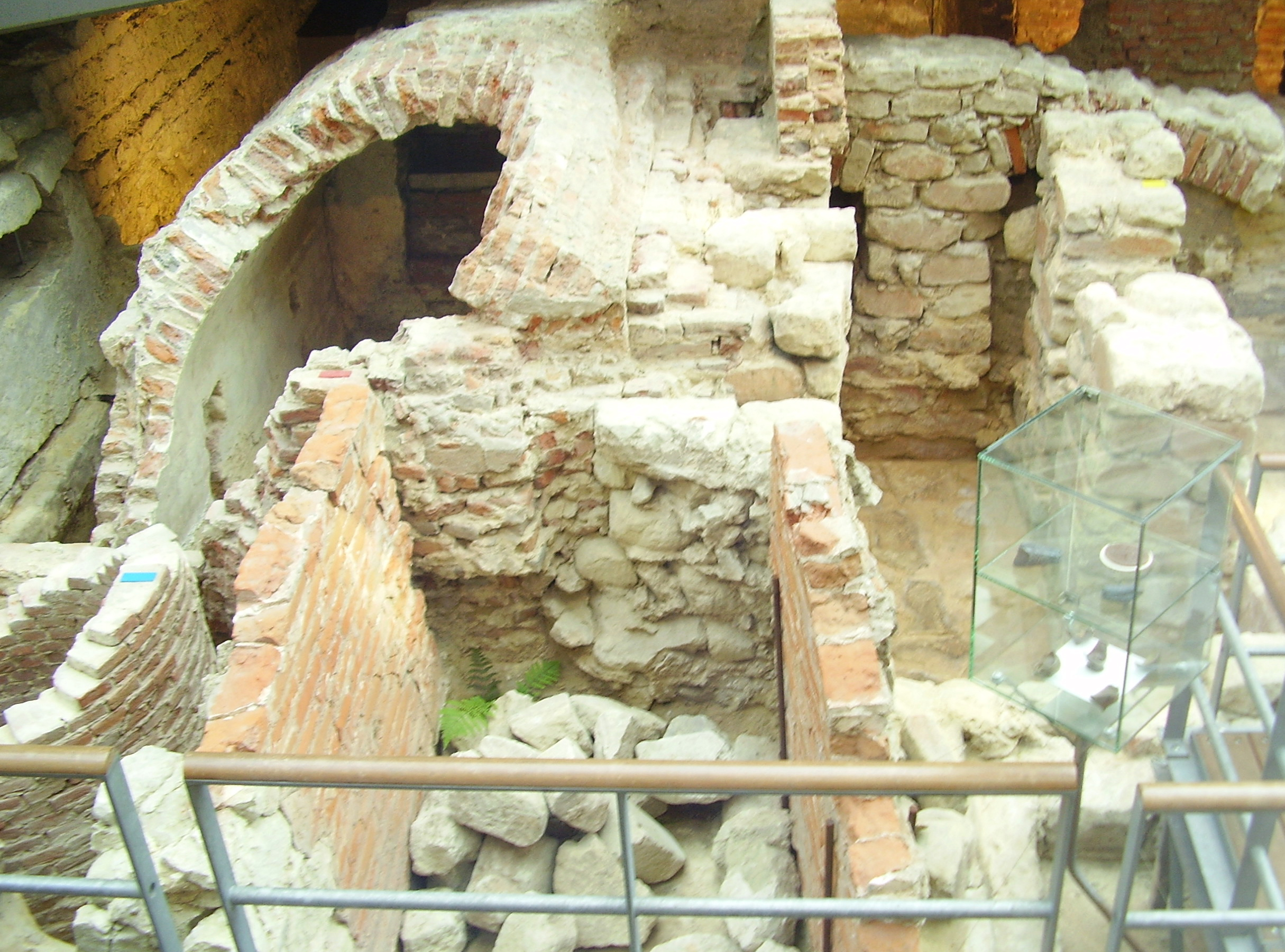 Description: Musée de site Bruxella 1238, Couvent des Récollets (Bruxelles) Author: User:Ben2 Date of creation: 08 juin 2006 Source: Photo personnelle